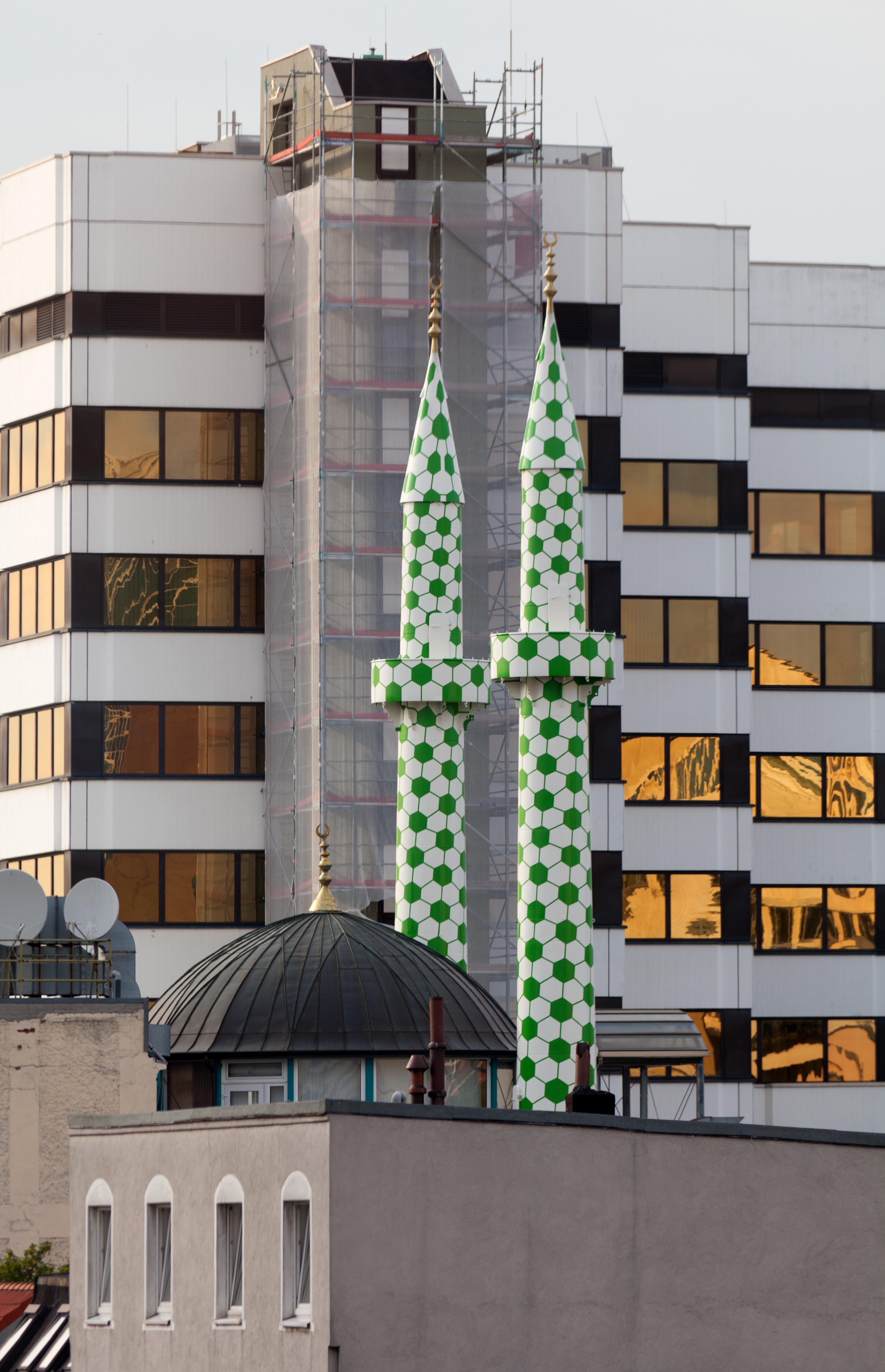 Minarette der Centrum-Moschee in der Böckmannstraße in St. Georg. Bemalung der Minarette nach einem Entwurf von Boran Burchhardt